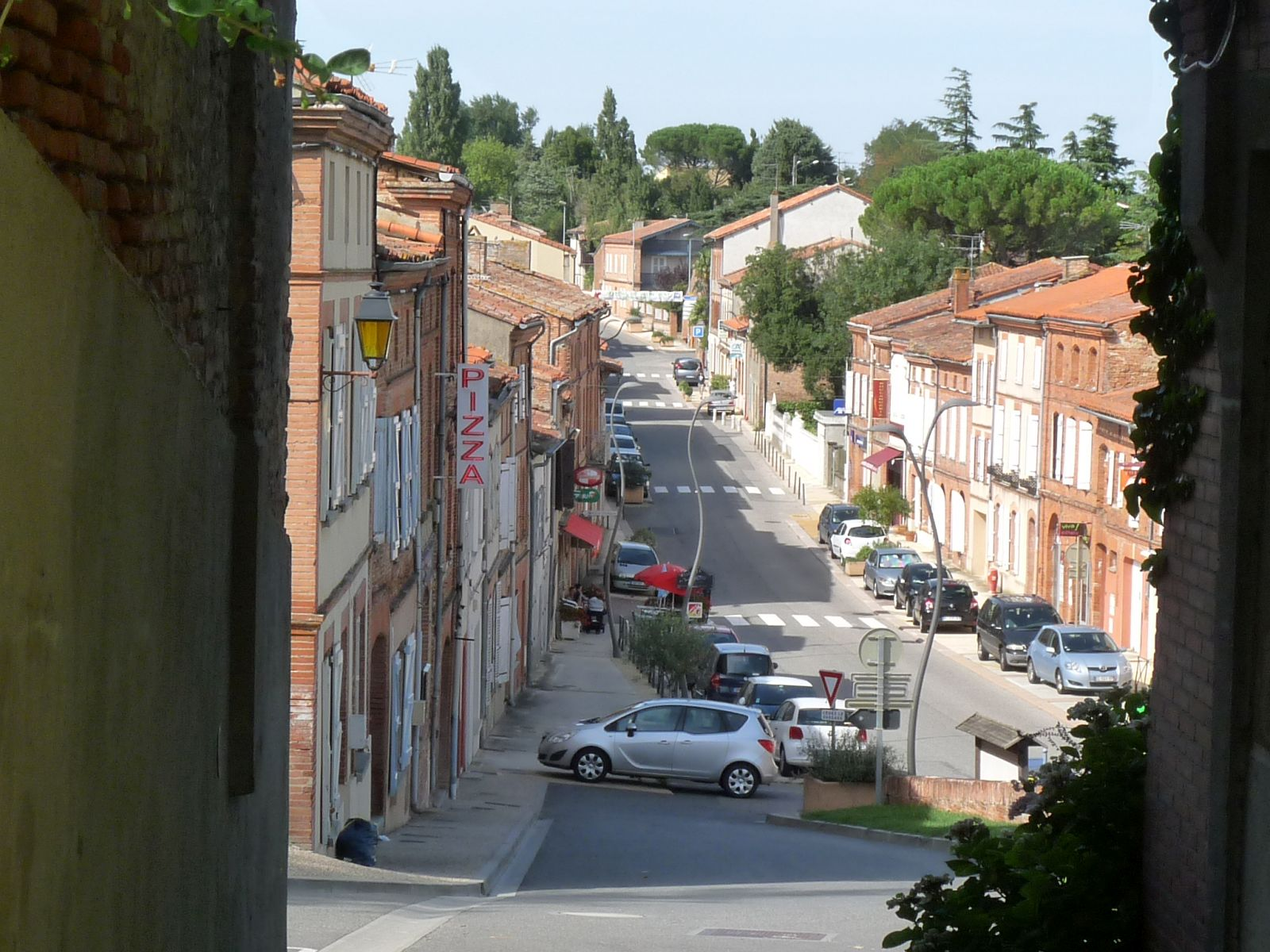 Centre-bourg (rue de la République) vu de la porte de la Vierge, Nailloux, Haute-Garonne, France